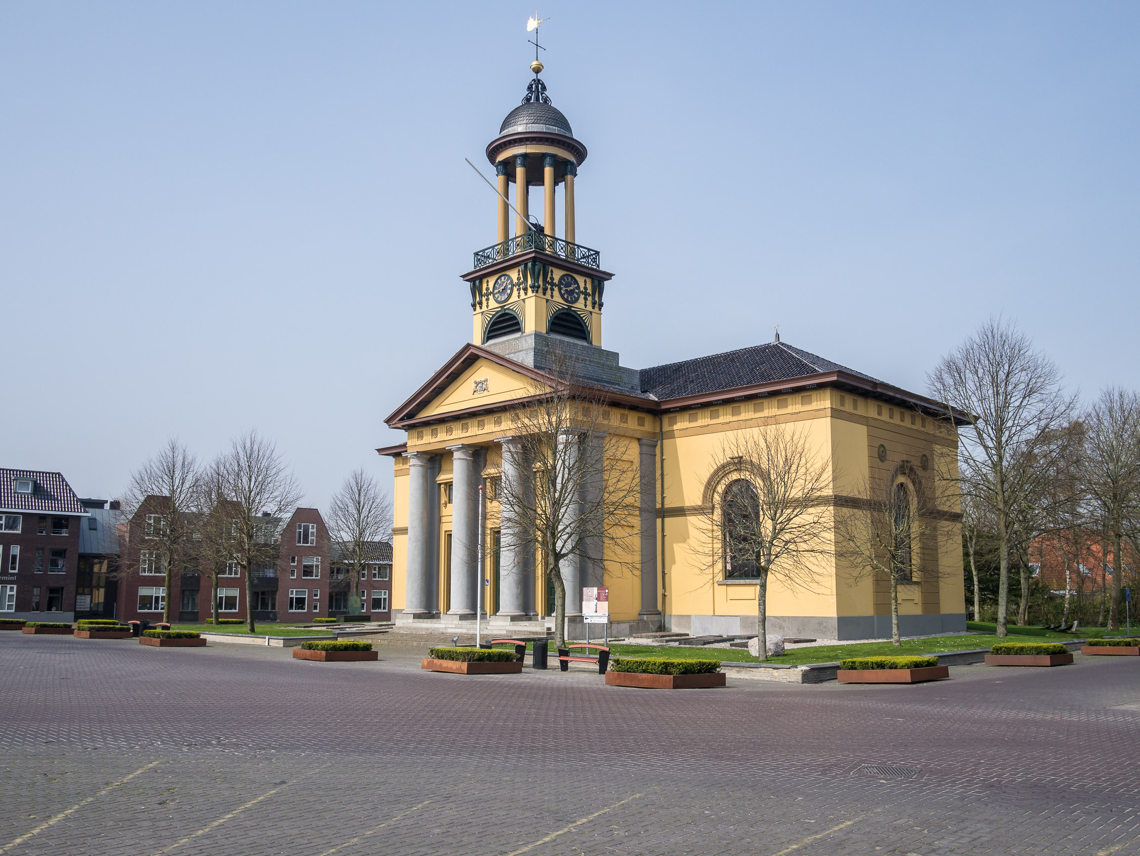 Groate Kerk van Sint Jacobiparochie